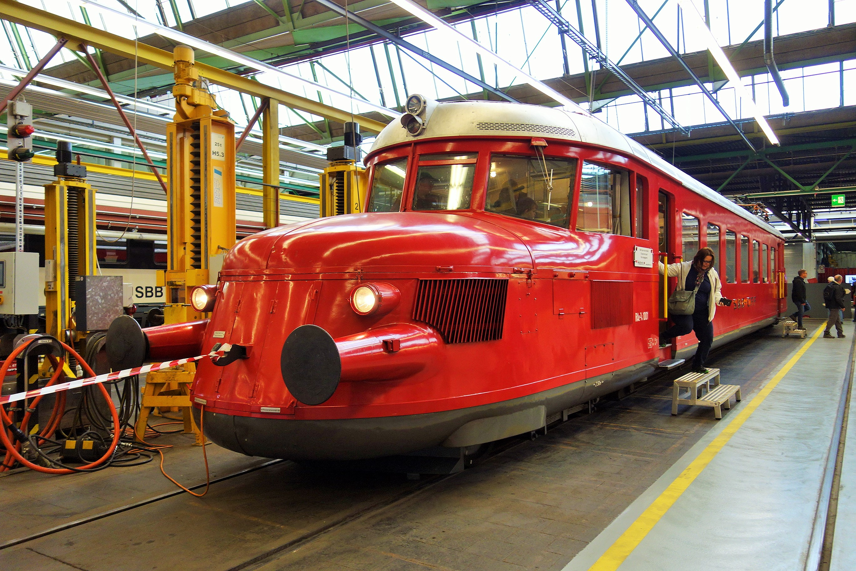 SBB Industriewerk Olten, Schweiz: Tag der offenen Tür 30. März 2019